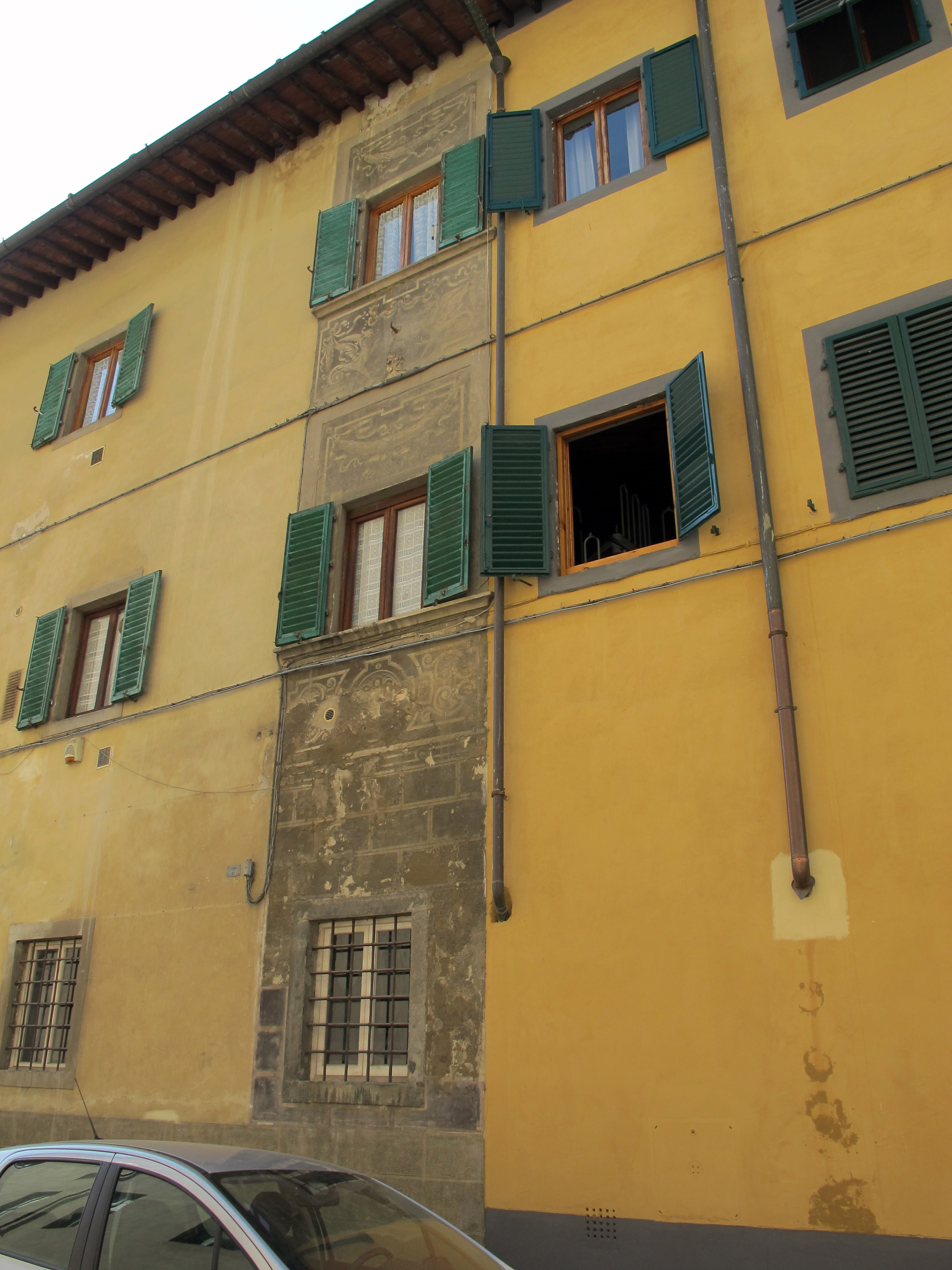 Via delle casine 9-11, ex- convento delle fanciulle del ceppo